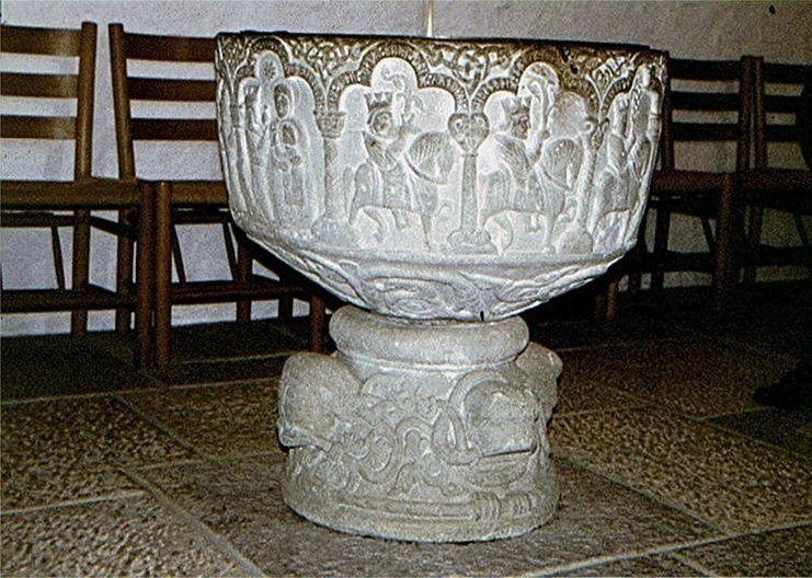 Aa Kirke på Bornholm